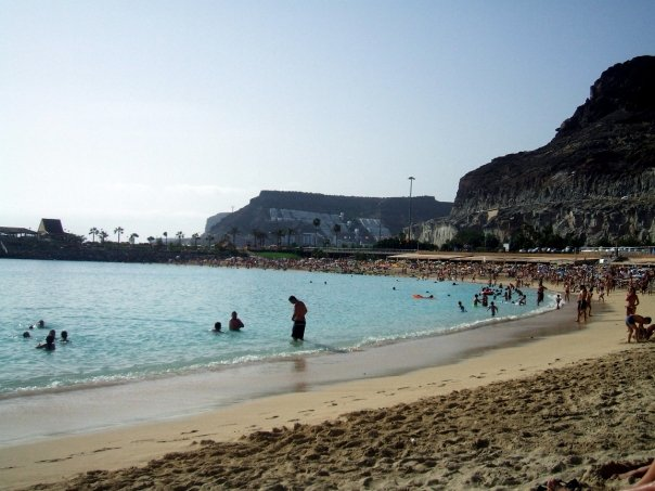 Playa de Amadores